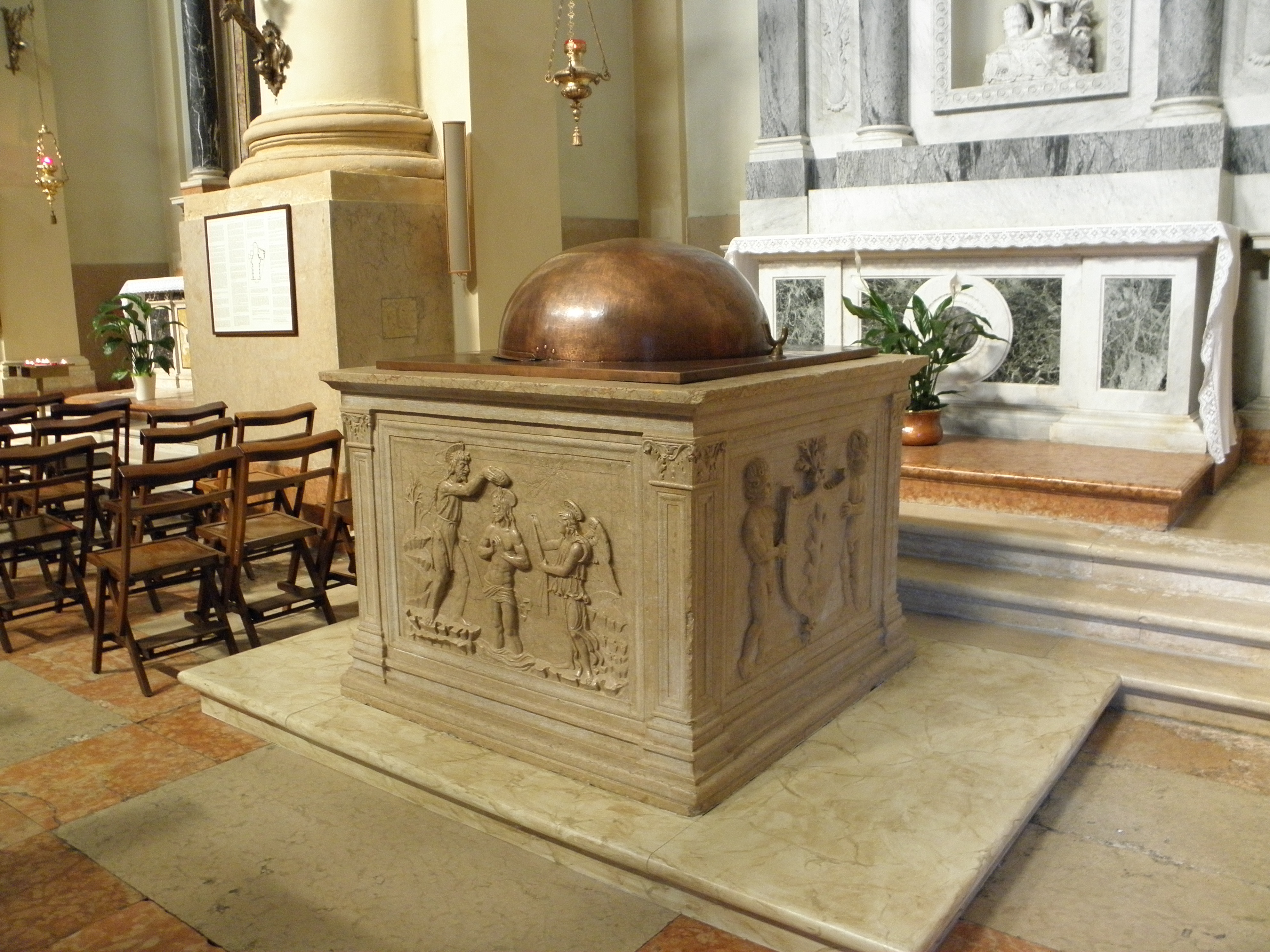 Legnago, Duomo di San Martino Vescovo: interno, il fonte battesimale situato davanti al primo altare laterale destro dedicato a San Giovanni Battista.